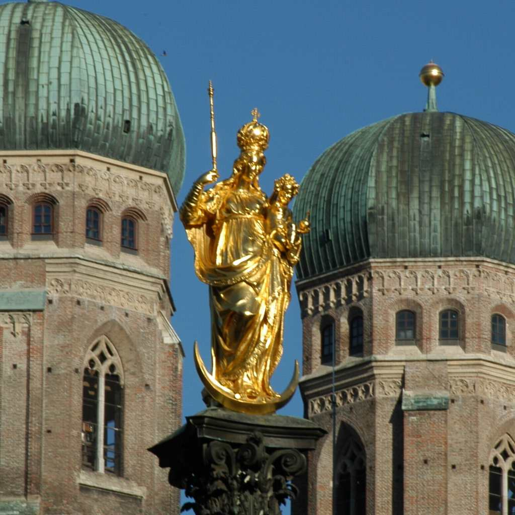 Beschreibung: Mariensäule und Frauenkirche Quelle: Fotografiert im Juni 2004 Fotograf: Christian Kreß Lizenzstatus: Bild-GFDL